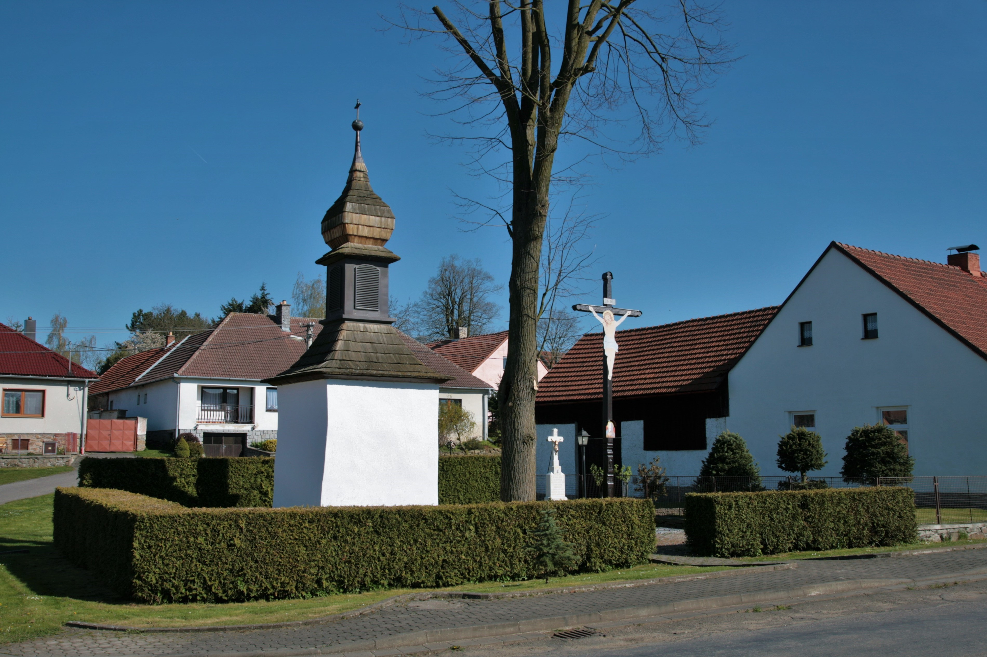 Obec Nová Ves v okrese Žďár nad Sázavou. Zvonice na návsi s kamenným a dřevěným křížem.